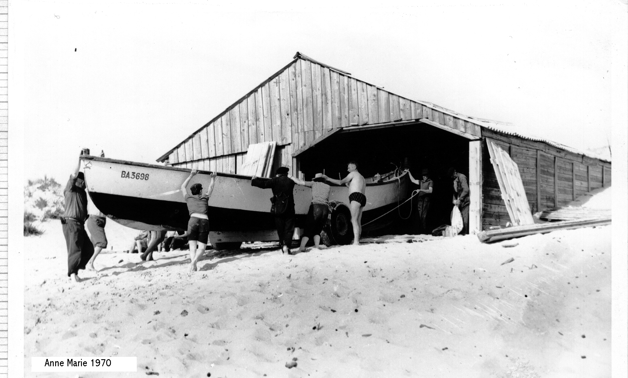 Pinasse Anne-Marie, retour au "parc" ; Cap de l'Homy, Lit-et-Mixe, France